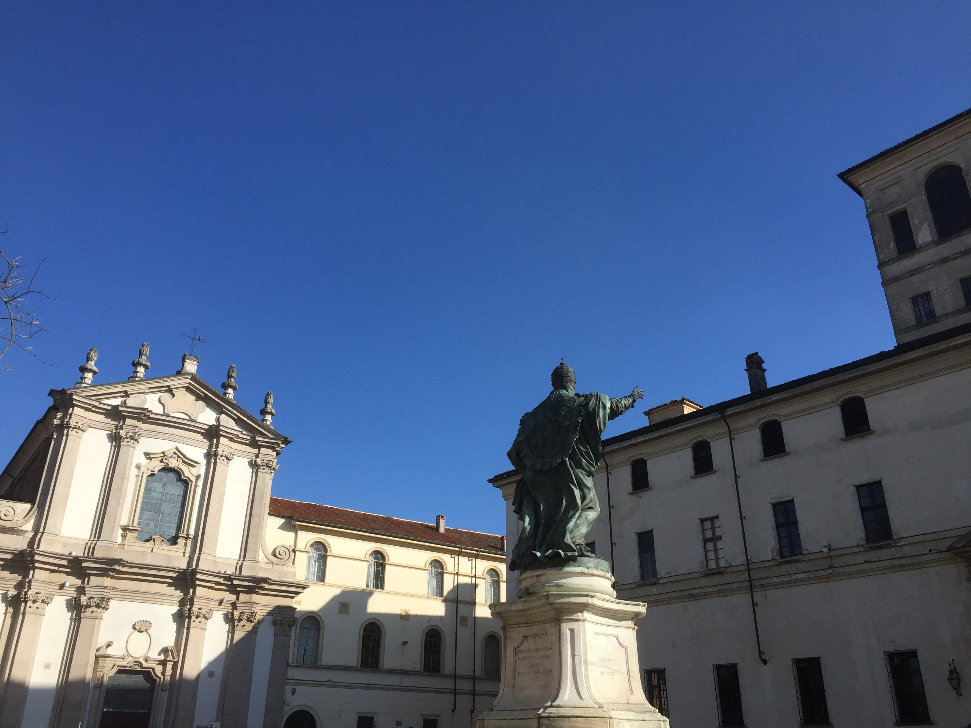 Pavia